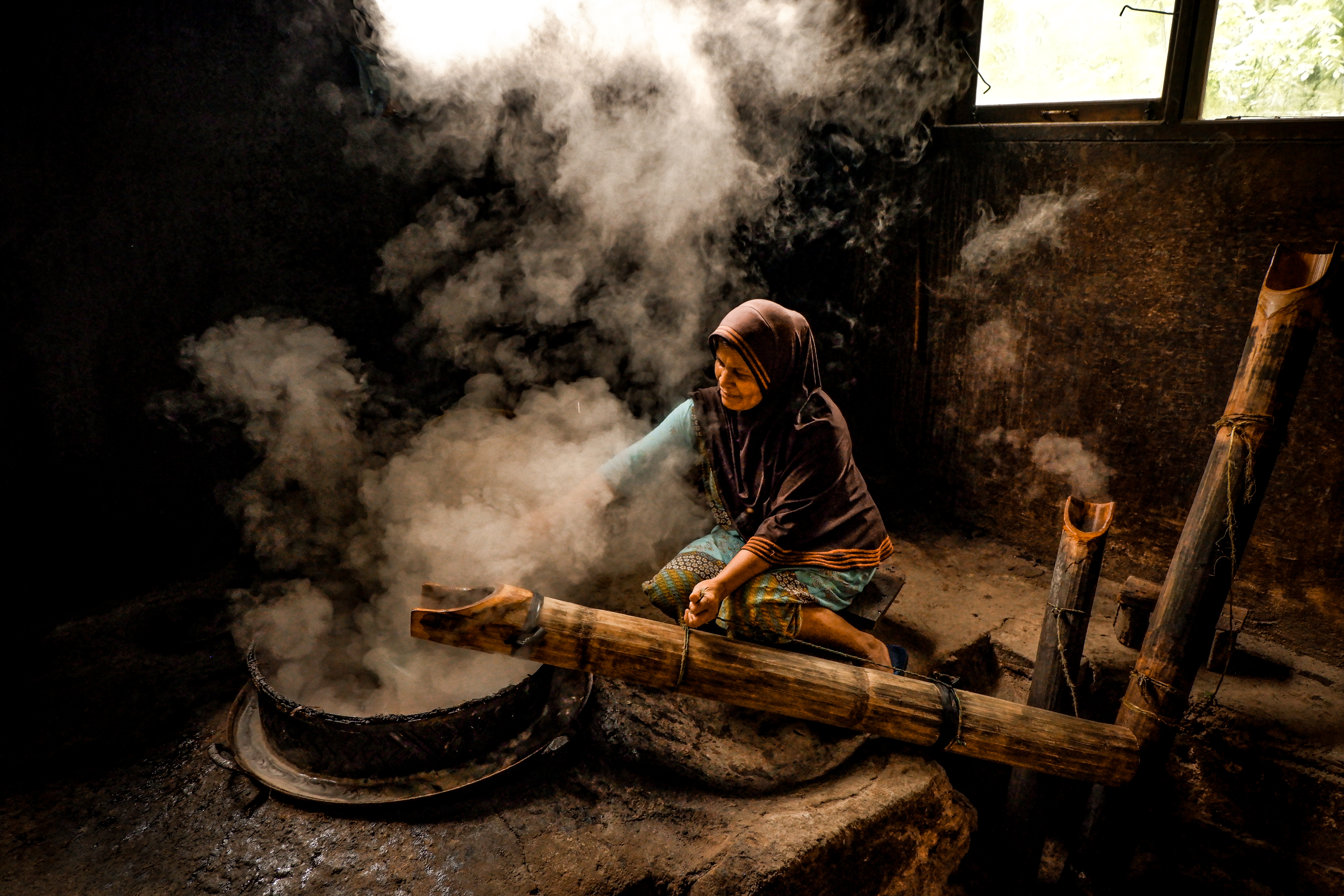 Ini adalah potret dari proses pembuatan gula aren yang sudah menjadi tradisi turun temurun di nagari andaleh baruh bukit, kabm tanah datar, Provinsi sumatra barat. Aren merupakan pohon yang lazim ditanam di daerah ini. Oleh karena itu, warga sejak dahulu kala telah menjadikan aren sebagai sumber penghasilan dan sumber daya bagi kehidupannya.